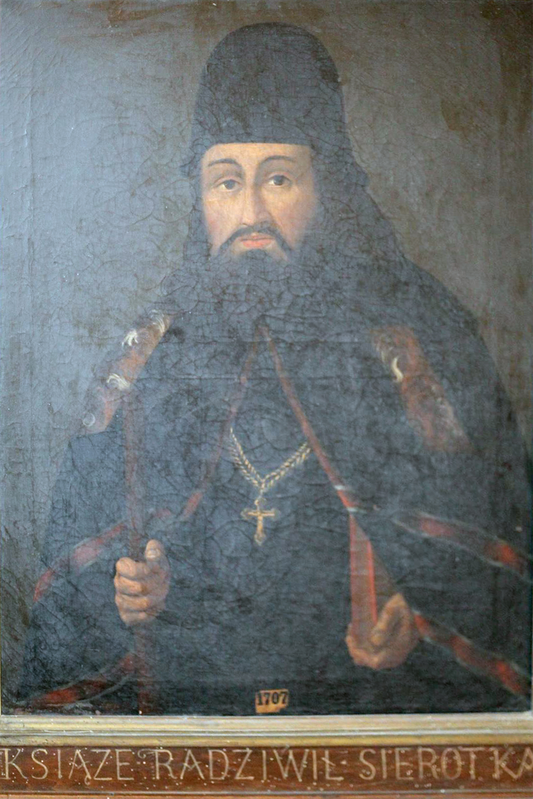 Беларуская (тарашкевіца): Партрэт Мікалая Радзівіла «Сіроткі» (Mikałaj Radzivił «Sirotka»)